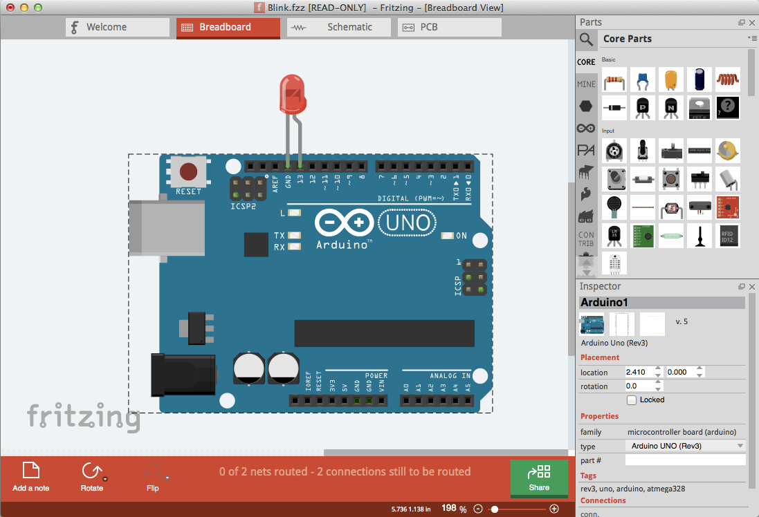 Fritzing Software, Breadboard View